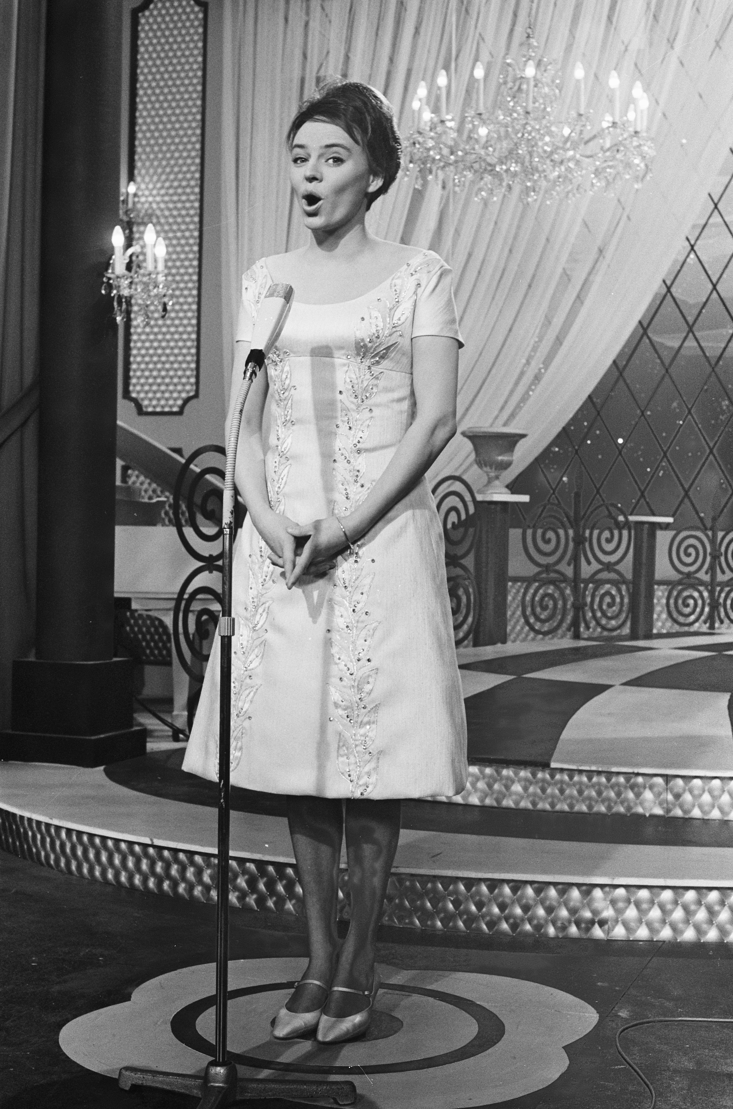 Collectie / Archief : Fotocollectie Anefo Reportage / Serie : [ onbekend ] Beschrijving : Eurovisie Songfestival 1962 te Luxemburg, voor Denemarken Ellen Winther Datum : 18 maart 1962 Locatie : Luxemburg, Luxemburg Trefwoorden : artiesten, songfestivals Persoonsnaam : Winther, Ellen Fotograaf : Pot, Harry / Anefo Auteursrechthebbende : Nationaal Archief Materiaalsoort : Negatief (zwart/wit) Nummer archiefinventaris : bekijk toegang 2.24.01.05 Bestanddeelnummer : 913-6602